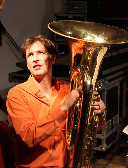 Carl Ludwig Hübsch auf dem SWR NEWJazz Meeting im Kölner Loft: „hübsch acht“, mit Carl Ludwig Hübsch - tuba, compositions, Isabelle Duthoit – clarinet, Joris Rühl – clarinet, Matthias Schubert – tenorsax, Wolter Wierbos – trombone, Philip Zoubek – piano, Joker Nies – electronics und Christian Lillinger - drums